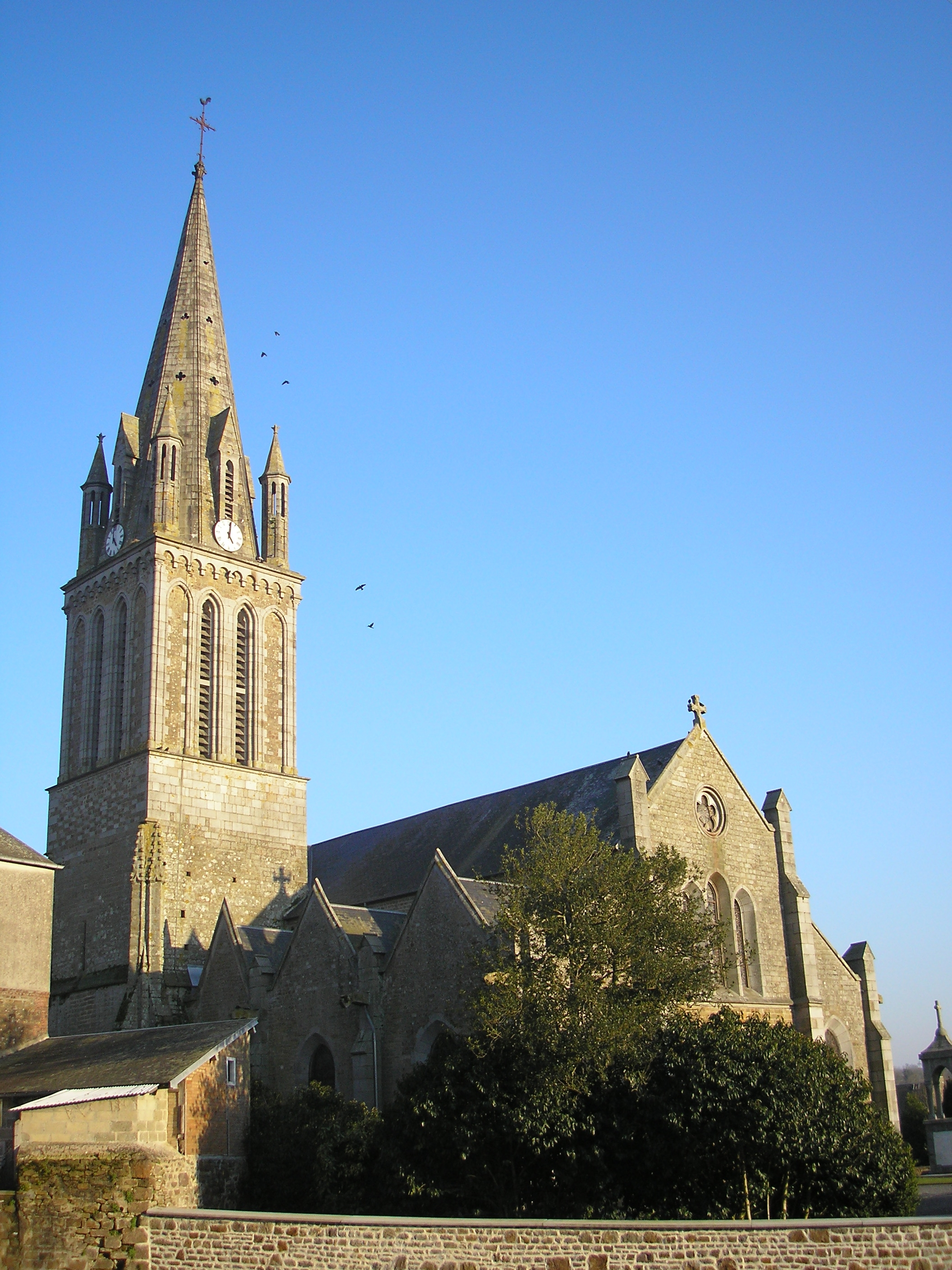 Tessy-sur-Vire (Normandie, France). L'église Saint-Pierre.